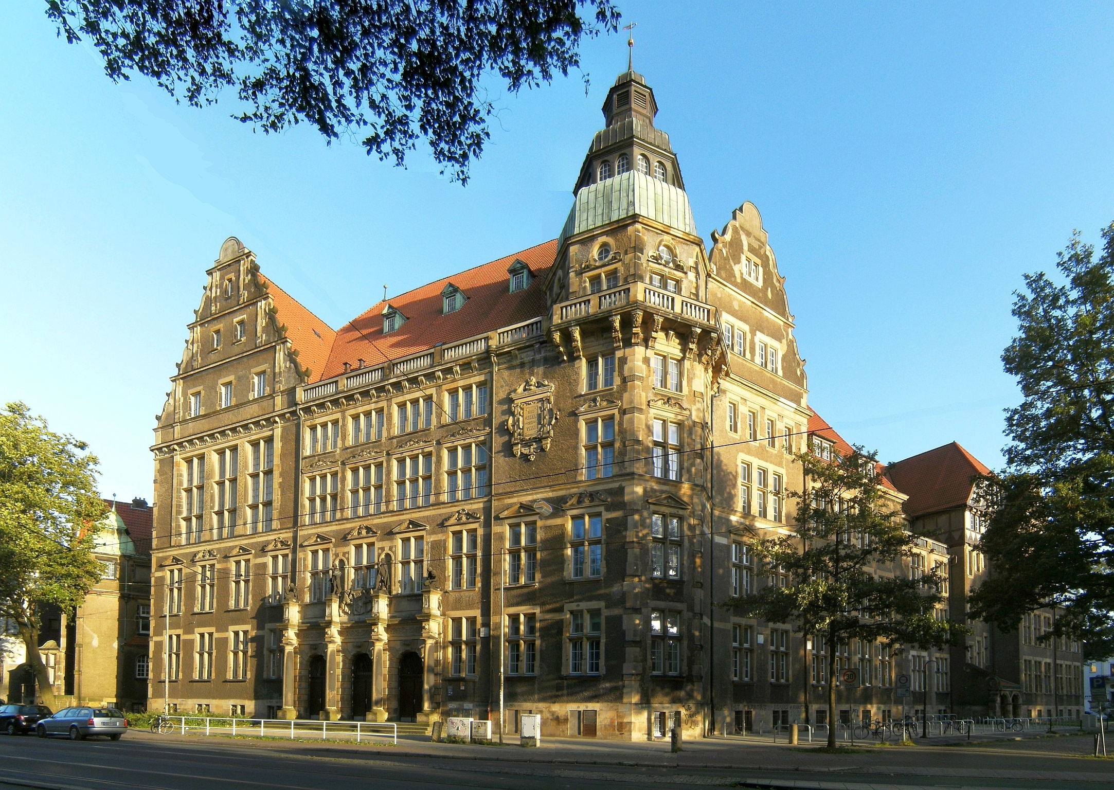 Realvollanstalt, Neues Gymnasium, Gymnasium an der Hermann-Böse-Straße in Bremen, Hermann-Böse-Straße 1.Das abgebildete Objekt ist ein geschütztes Kulturdenkmal in der Freien Hansestadt Bremen, mit der Nr. 0591,T beim Landesamt für Denkmalpflege registriert.